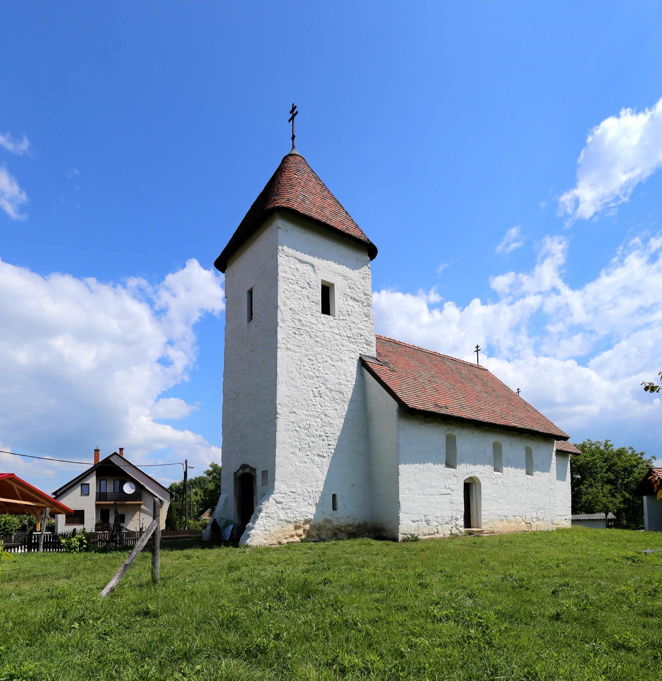 Hévízgyörk (Szent Márton) Öregtemplom